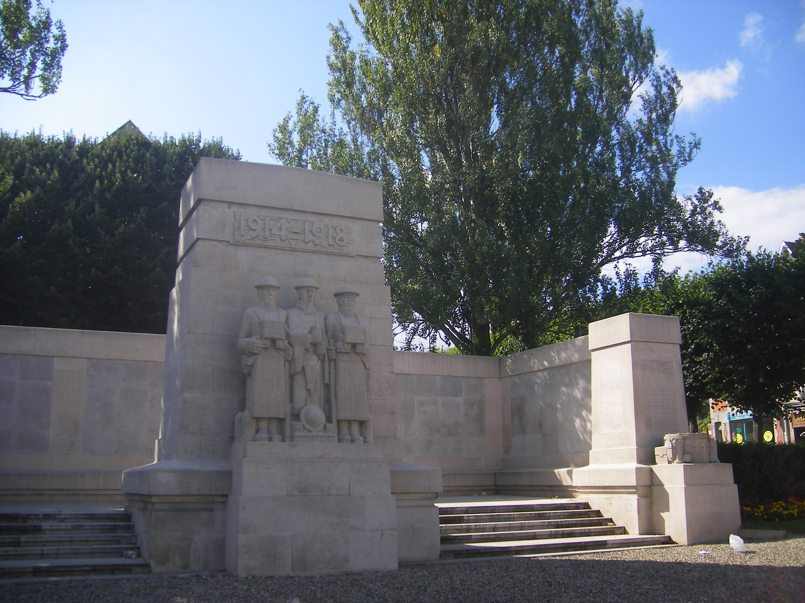 Soissons